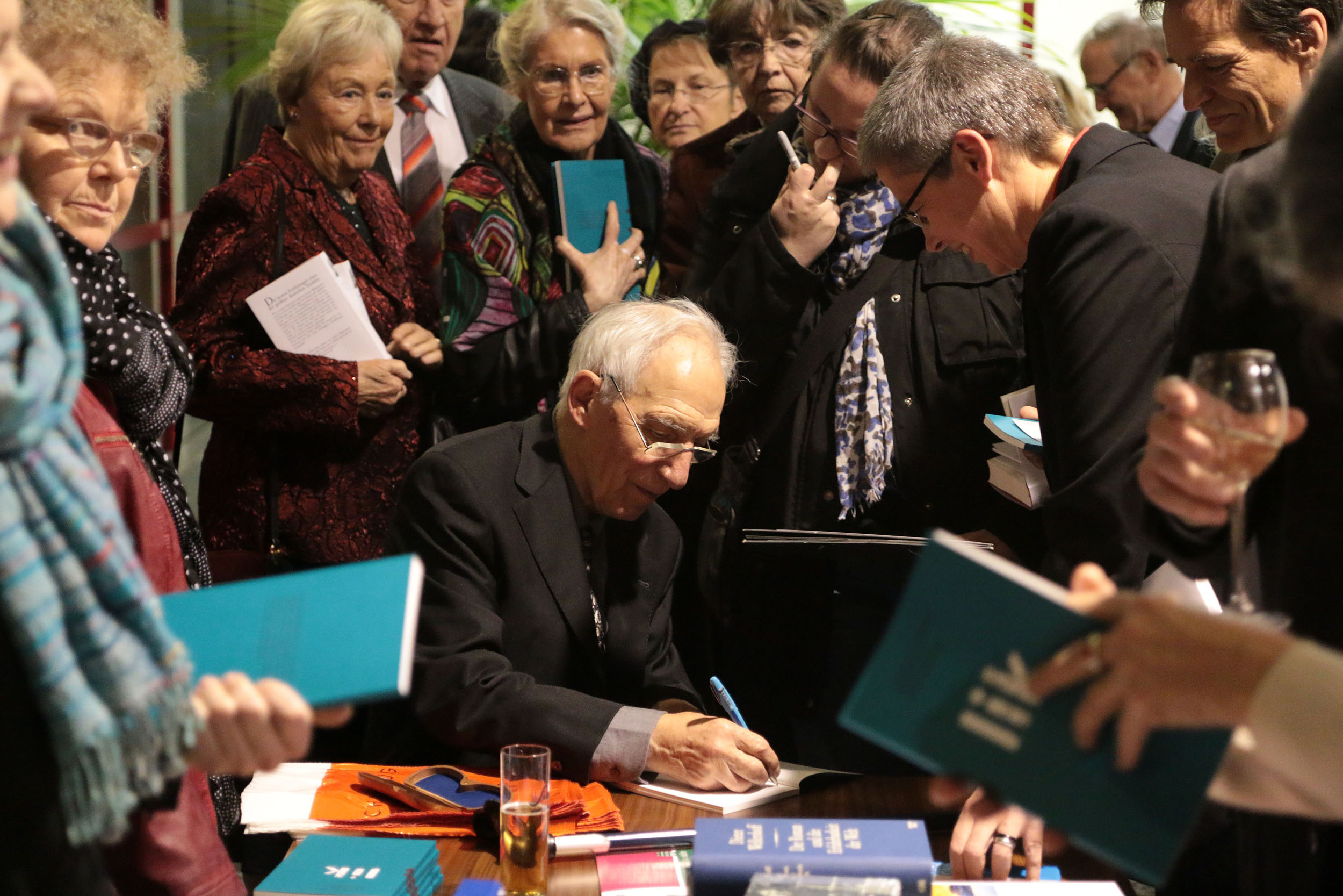 Der Schriftsteller Dieter Wellershoff- umgeben von Fans, bei eeiner Autogrammstunde anläßlich eines Empfangs der Stadt Köln zu seinem 90ten Geburtstag im Alten Rathaus, Nov. 2016